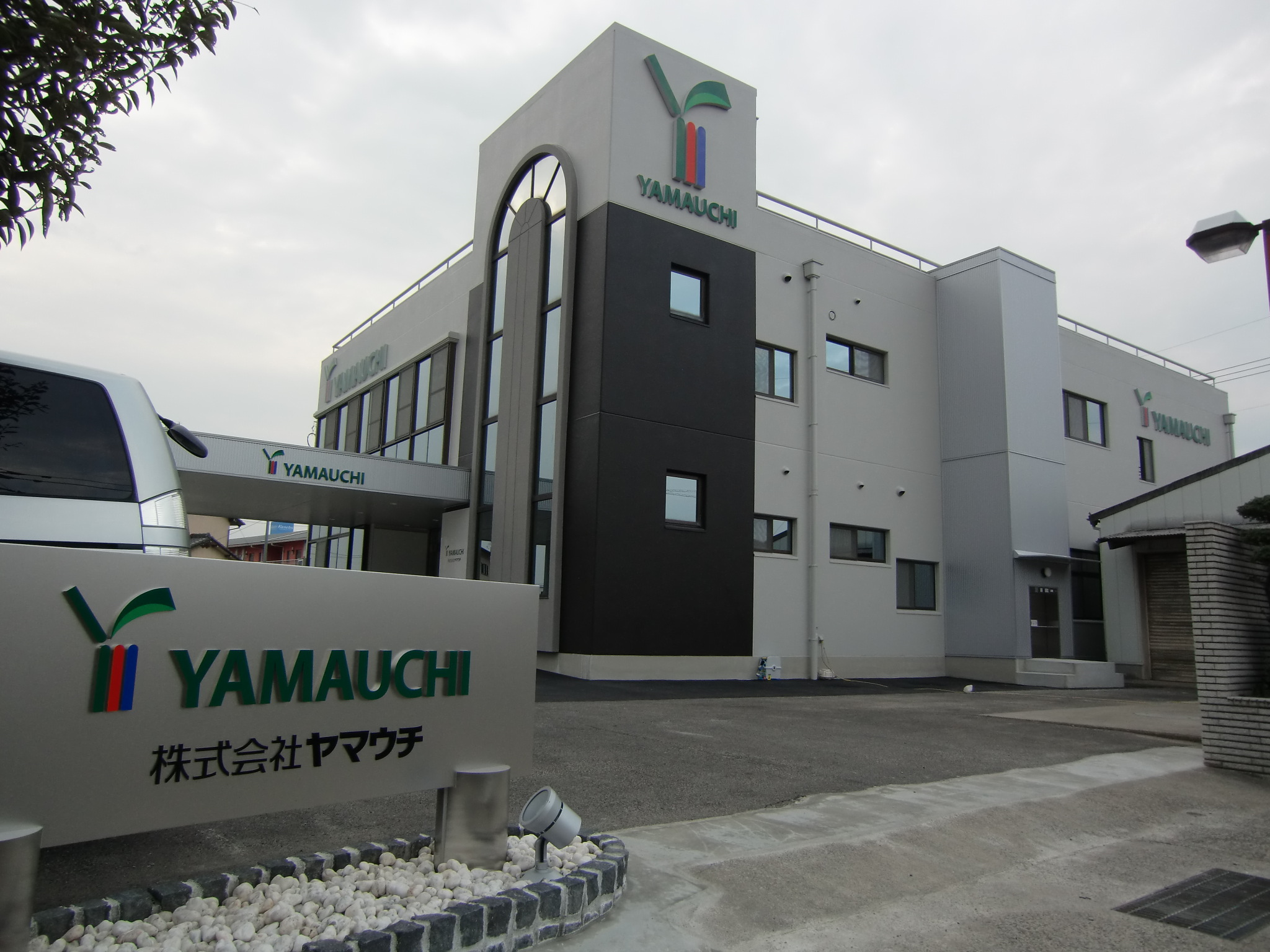 ヤマウチ本社社屋